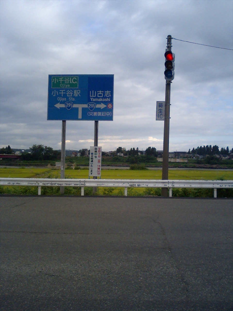 この画像は2006年9月3日朝、投稿者によって新潟県小千谷市薭生インターチェンジ内車道上にて撮影された、道路標識と小千谷大橋の写真。道路標識からは「国道291号の山古志方面は（新潟県中越地震の為に）通行止めだが災害復旧工事中である」事、その下に仮設されている看板からは「国道291号は撮影日の16時30分に開通される」事が読み取れる。